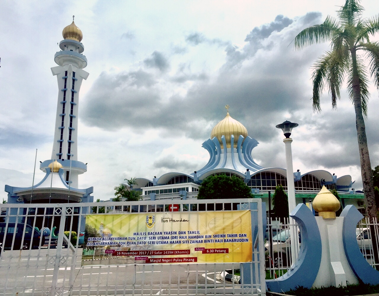 槟州州立清真寺全景